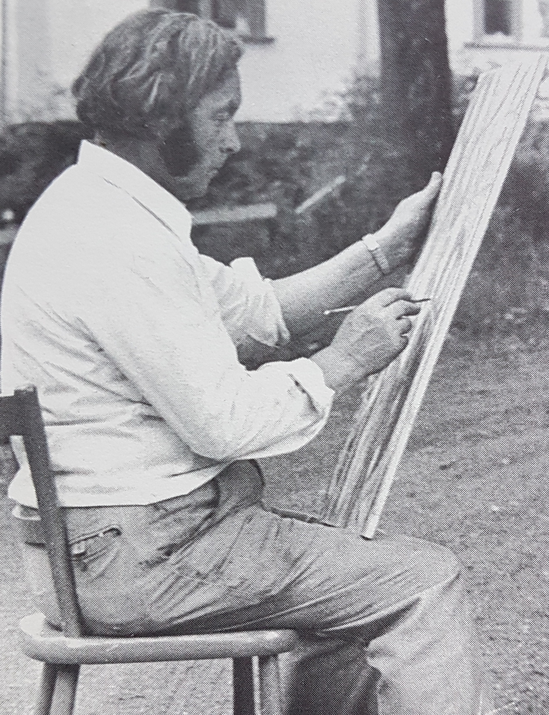 Herbert Walås Artist.from Sweden